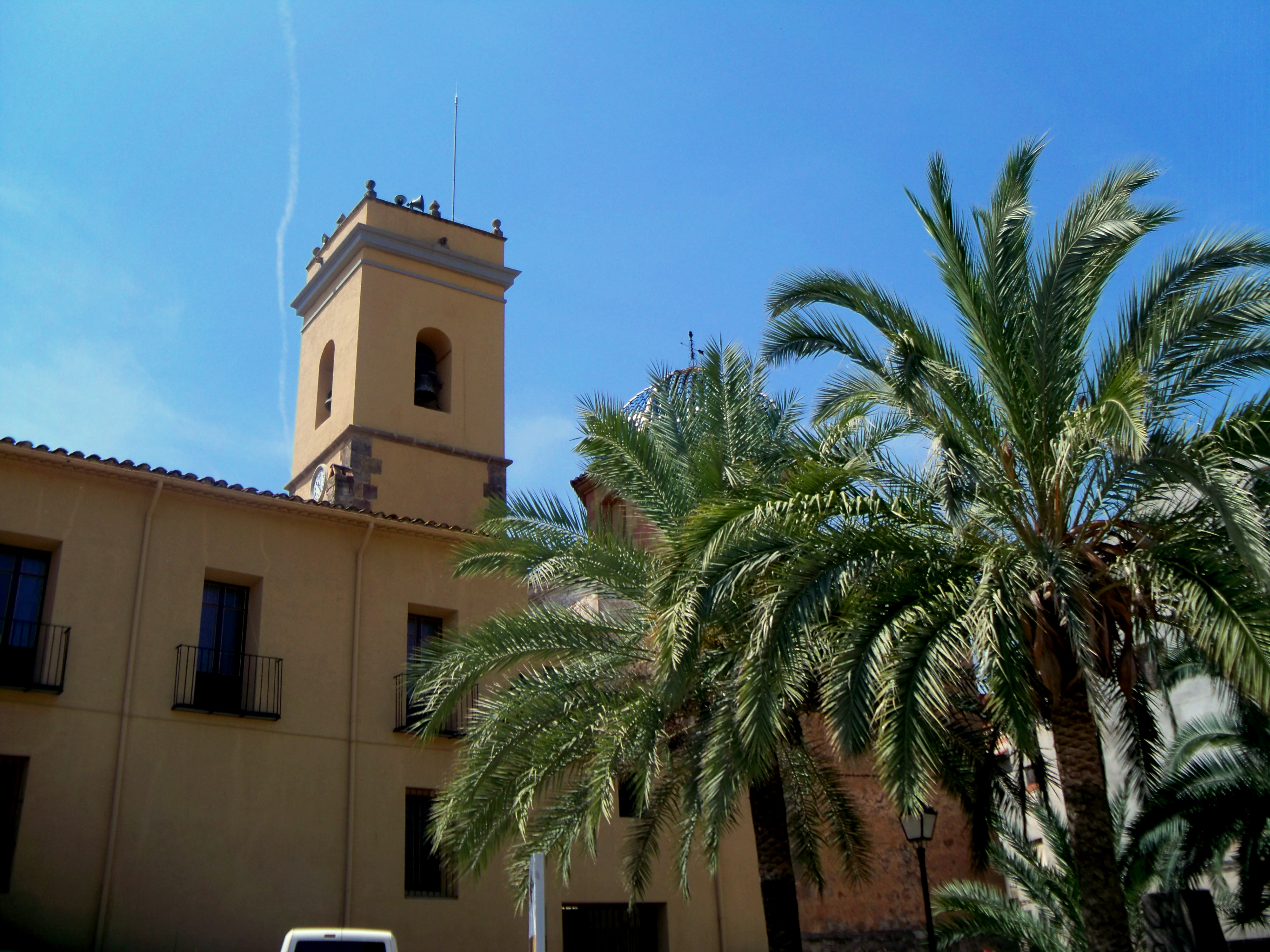 Plaza "dels dolçainers" en Tales